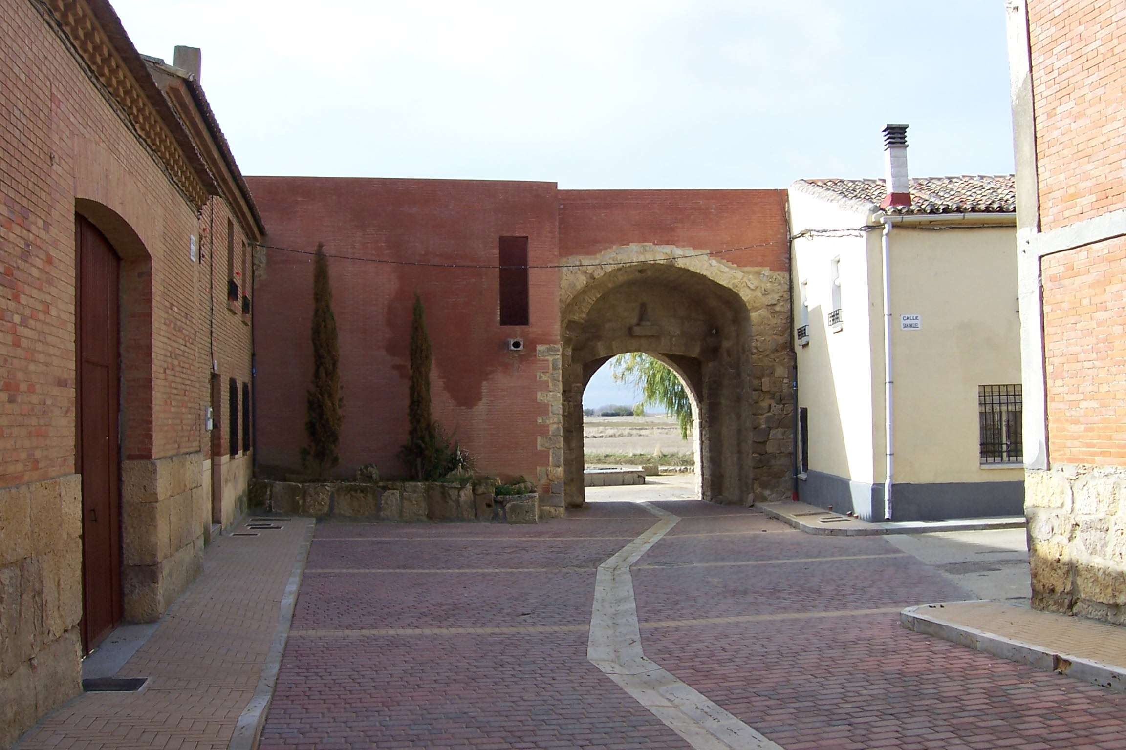 Támara de Campos (Palencia, España). Arco del Caño, único resto de la muralla medieval.